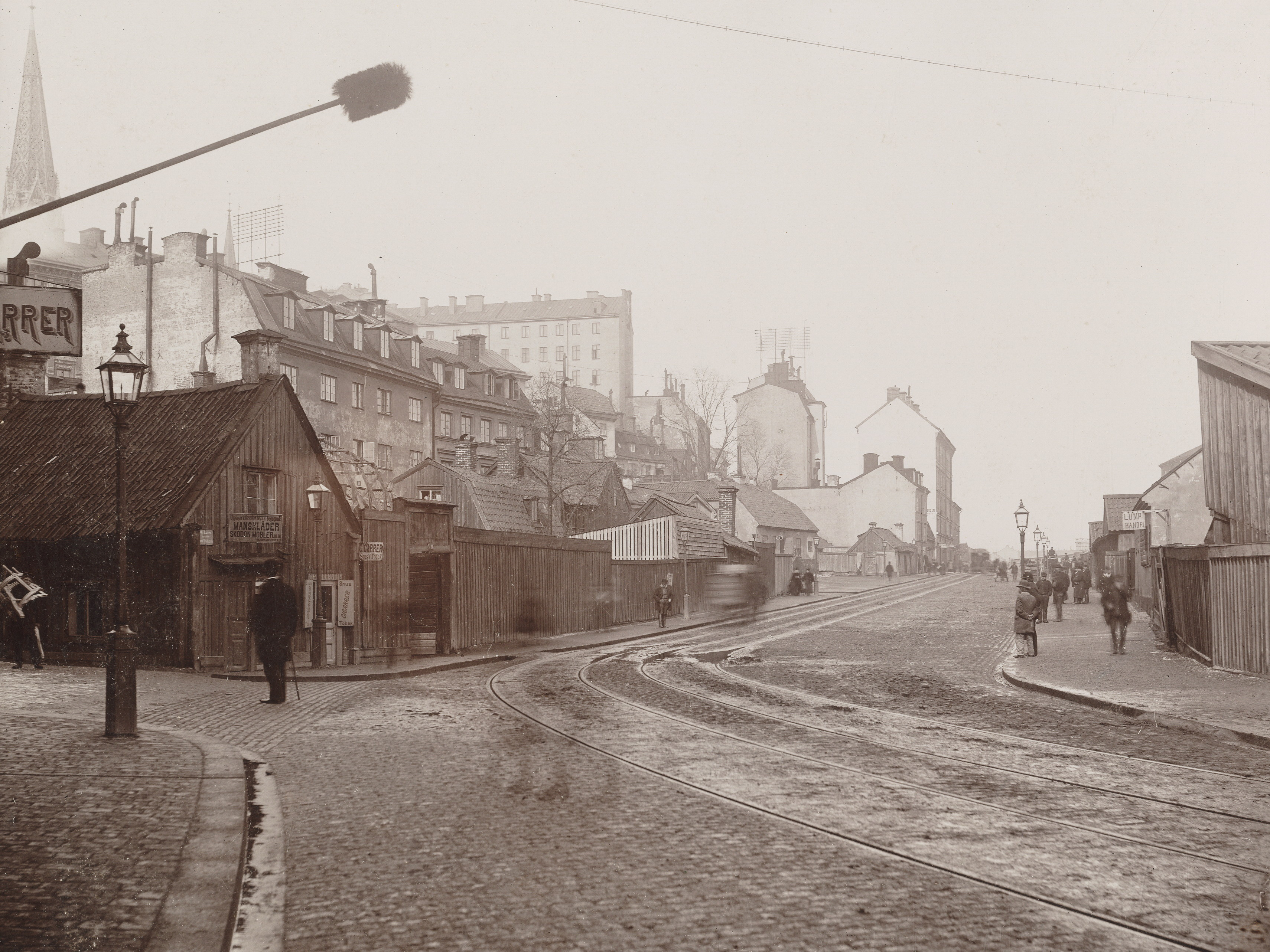 Kvarteret Italien Större, Stora Träskgatan (dagens Birger Jarlsgatan) vid Snickarbacken, norrut